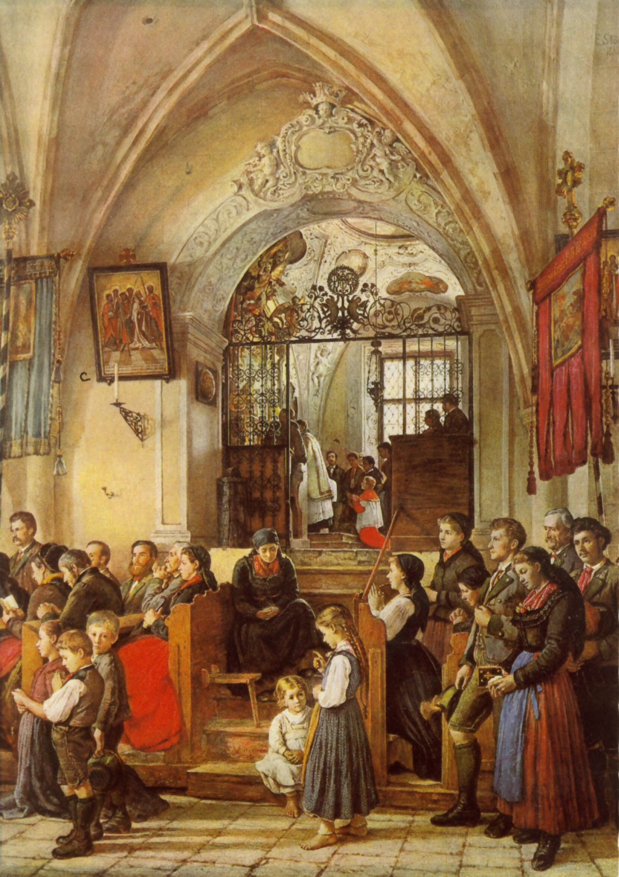 Pfarrkirche Bad Aussee, Frauenkapellelabel QS:Lde,"Pfarrkirche Bad Aussee, Frauenkapelle"